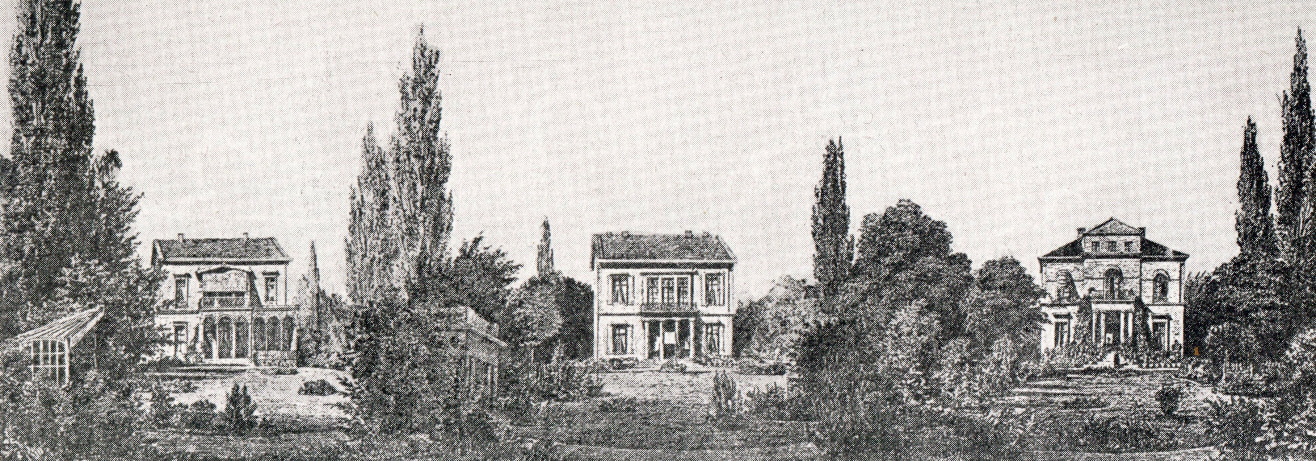 Hamburg Harvestehuder, Harvestehuder Weg um 1850, Hausnummern 10-12, heute Musikhochschule; Lithographie von Valentin Ruths: Landhäuser an der Alster, hier: Landhäuser der Familien Hellmrich, Albrecht und Sloman.